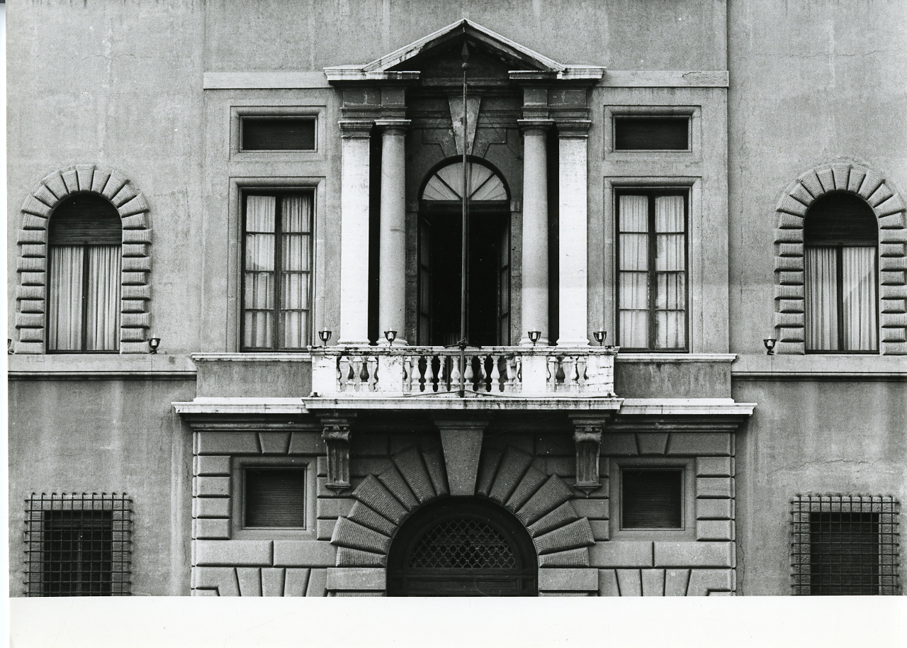 Servizio fotografico : Roma, 1979 / Paolo Monti. - Stampe: 4 : Positivo b/n, gelatina bromuro d'argento/ carta, 24x30. - ((Al verso delle stampe manoscritto numero di negativo corrispondente: 3302/31, 3302/30, 3302/34, 3302/37, 3303/2, 3303/5, 3303/103303/13, 3303/18. Sul coperchio della scatola manoscritto a pennarello nero: "Roma". - Occasione: Documentazione per la ubblicazione: " Fumagalli, Alberto "Mirabilia Romae: il centro storico nell'arte attraverso i secoli", Milano Cariplo 1979. - di Paolo Monti: Nikon Leika 3001-/ Monti 1978 (1978-1982), presso Archivio Paolo Monti. - Fonte: Fattura di Paolo Monti: IV. Commesse/ Fattura n. 17/ Fotografie centro storico di Roma per Cariplo (1979/06/11), presso Archivio Paolo Monti. - Fonte: Monografia di Fumagalli, Alberto: Mirabilia Romae: il centro storico nell'arte attraverso i secoli, Milano, Cariplo (1979). - Fonte: Agenda